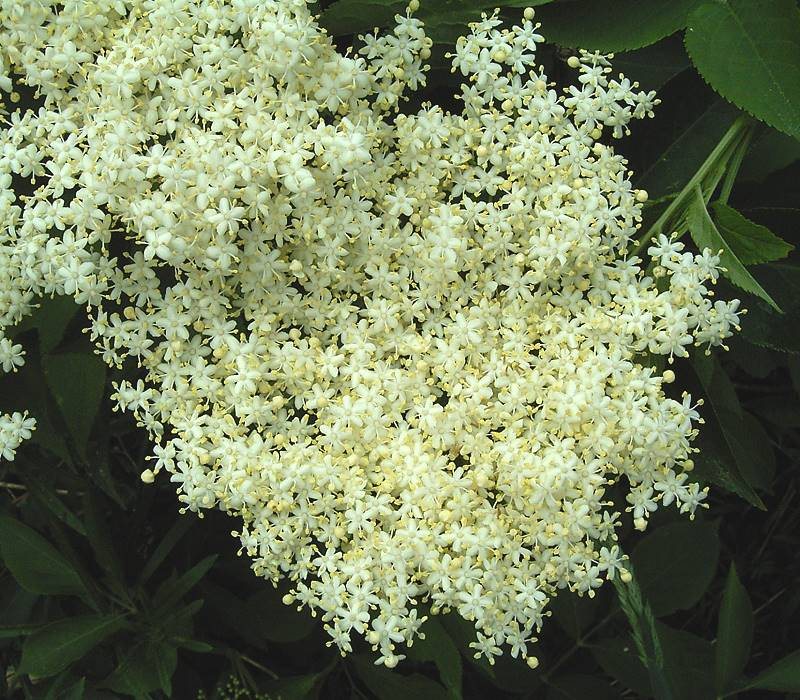 Sambucus nigra